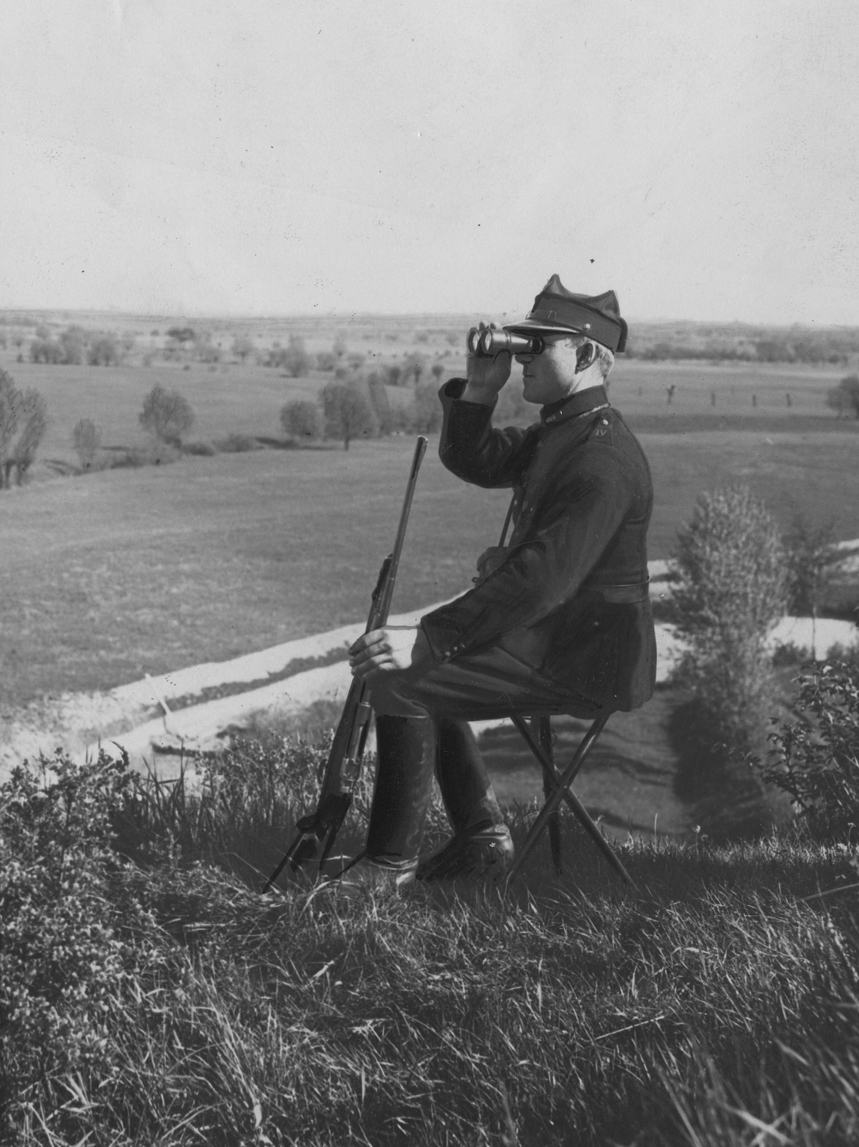 Funkcjonariusz Straży Celnej obserwuje teren przez lornetkę. Koncern Ilustrowany Kurier Codzienny - Archiwum Ilustracji. Sygnatura: 1-G-6482